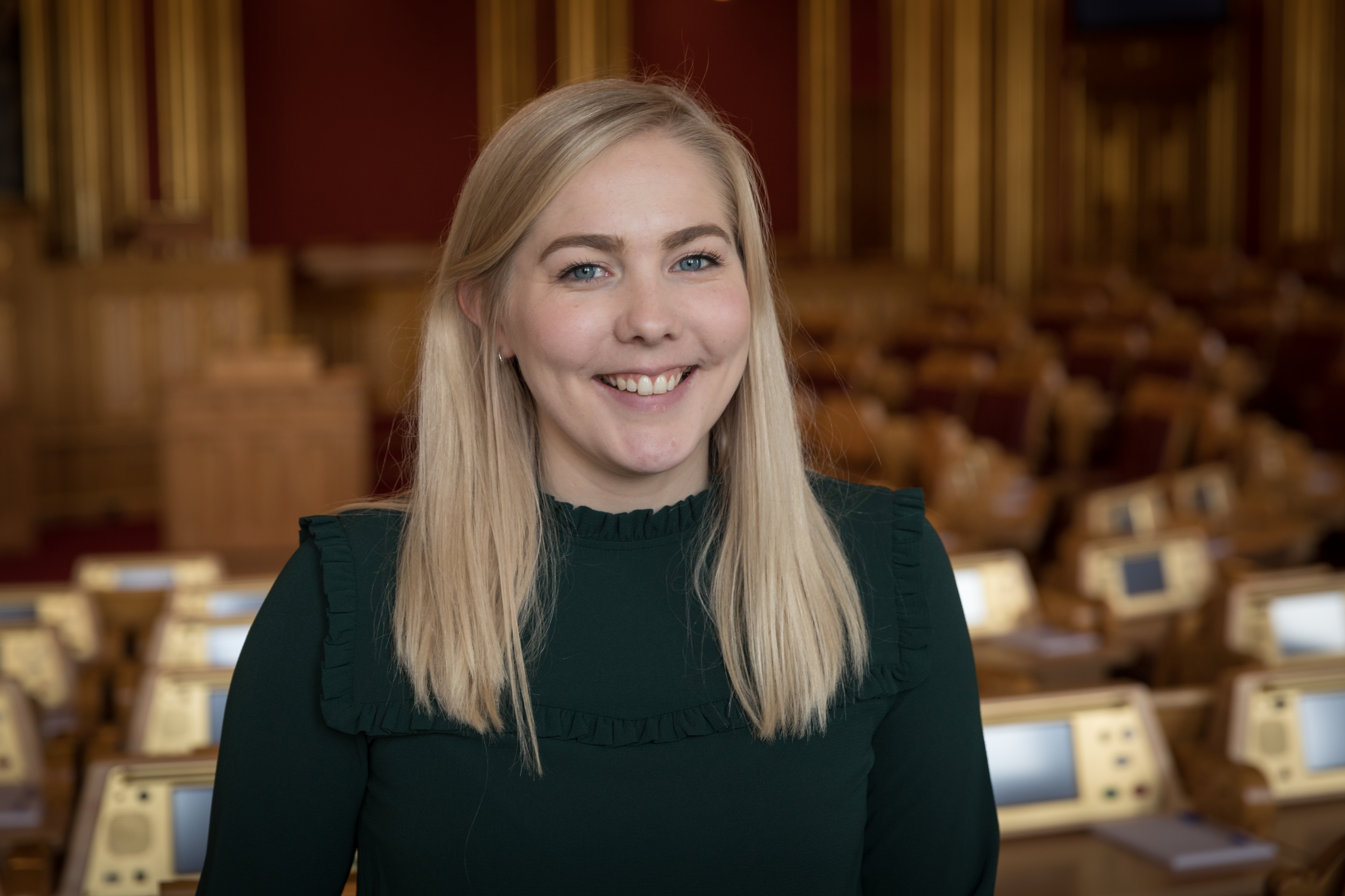 Mari Holm Lønseth, Høyre-politiker.